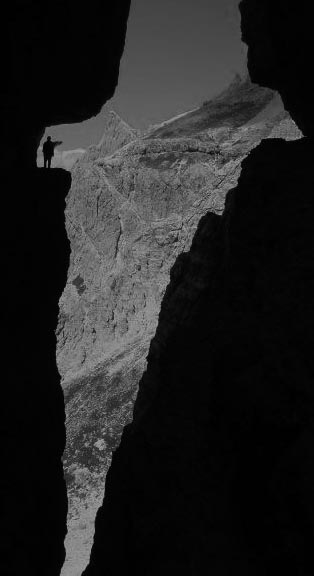 Sentiero degli Alpini, Alto Adige, Italia. Uploaded first to Italian Wikipedia: Author /: Luca Lorenzi (user:Llorenzi) License / Licenza: GNU categoria:Vie ferrate